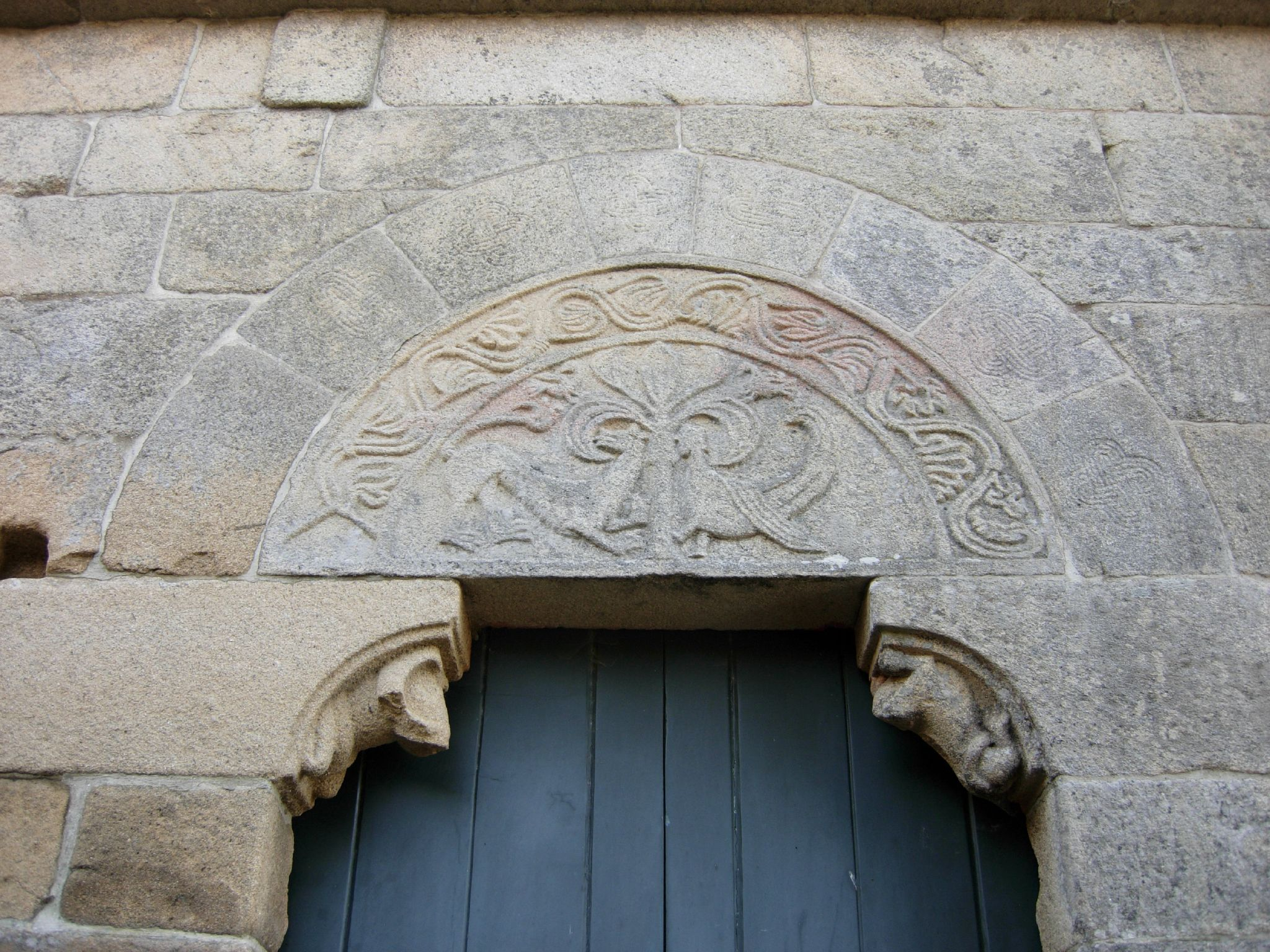 Portada septentrional en cuyo tímpano encontramos una representación del árbol de la vida. Y habiendo expulsado al hombre, puso delante del jardín de Edén querubines, y la llama de espada vibrante, para guardar el camino del árbol de la vida. Génesis 3:24